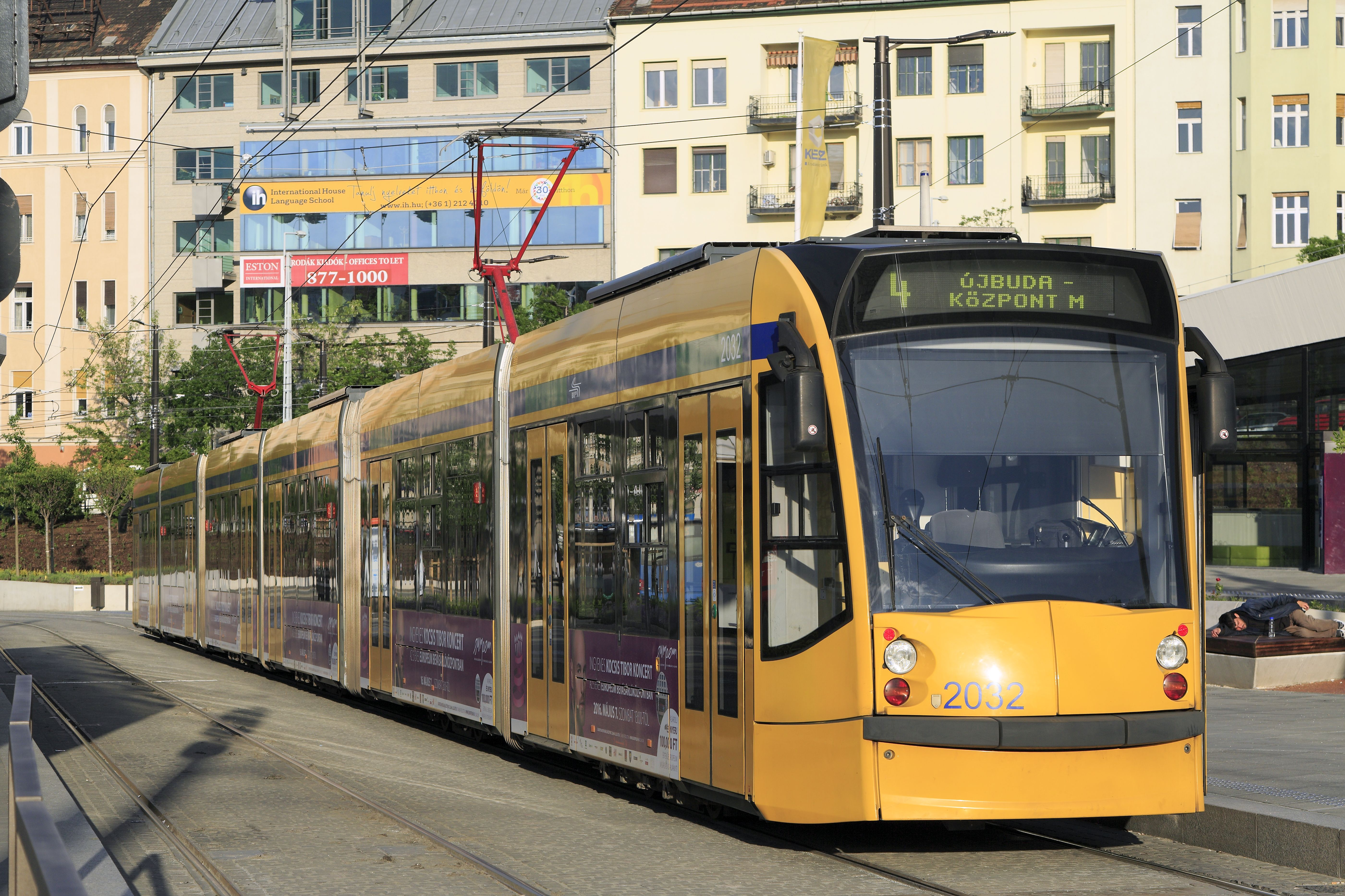 Am Abfahrtsbahnsteig der Linien 4 und 6 Richtung Osten, der Zug der Linie 4 wird nach Újbuda-Központ fahren.Die Budapester Combino Plus bestehen im Prinzip aus drei niederflurigen Kurzgelenkwagen, die Gelenke zwei und vier bieten deutlich mehr Freiheitsgrade.